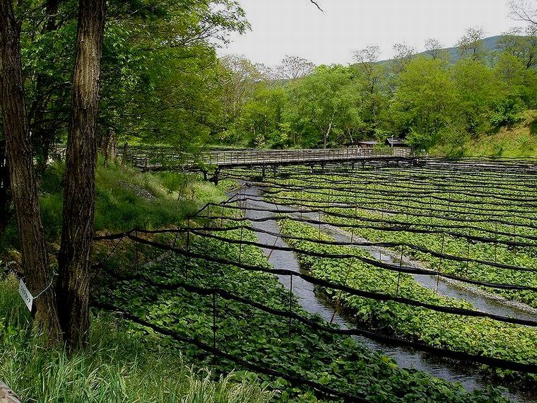 長野県安曇野市穂高、大王わさび農場